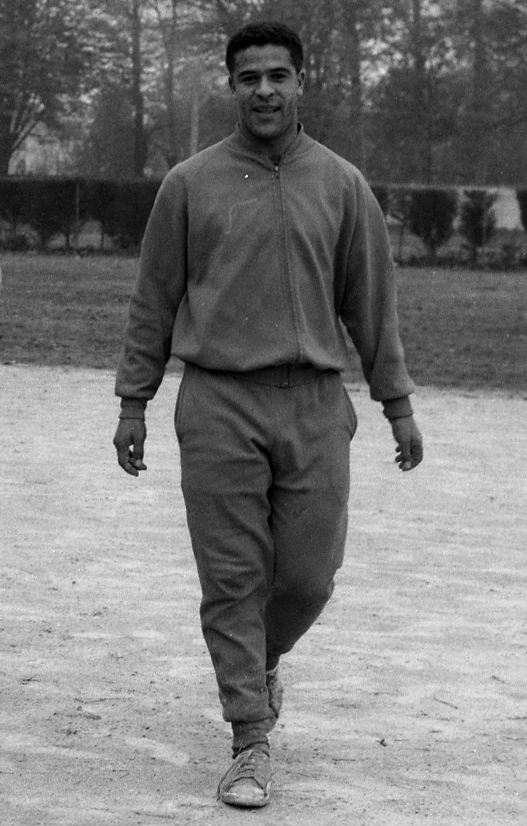 28 novembre 1962. Vue de face de Ernest Schultz (à gauche) et de Khennane Mahi (à droite), joueurs du Toulouse Football Club. Cliché pris certainement à l'entrainement.